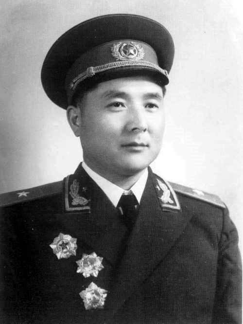 向守志1955年授衔照。